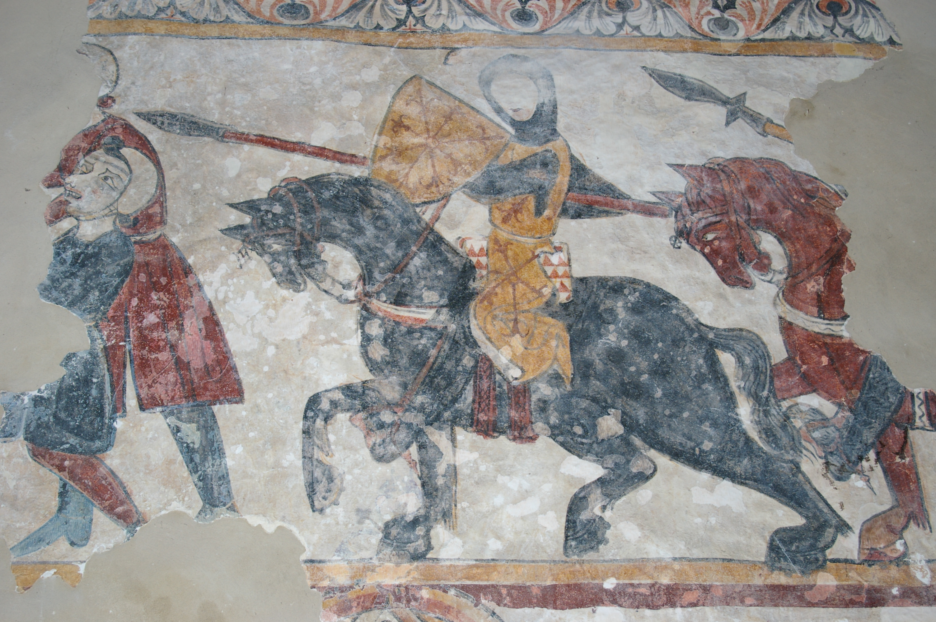 Fresque 2 Eglise St Vigor de Neau